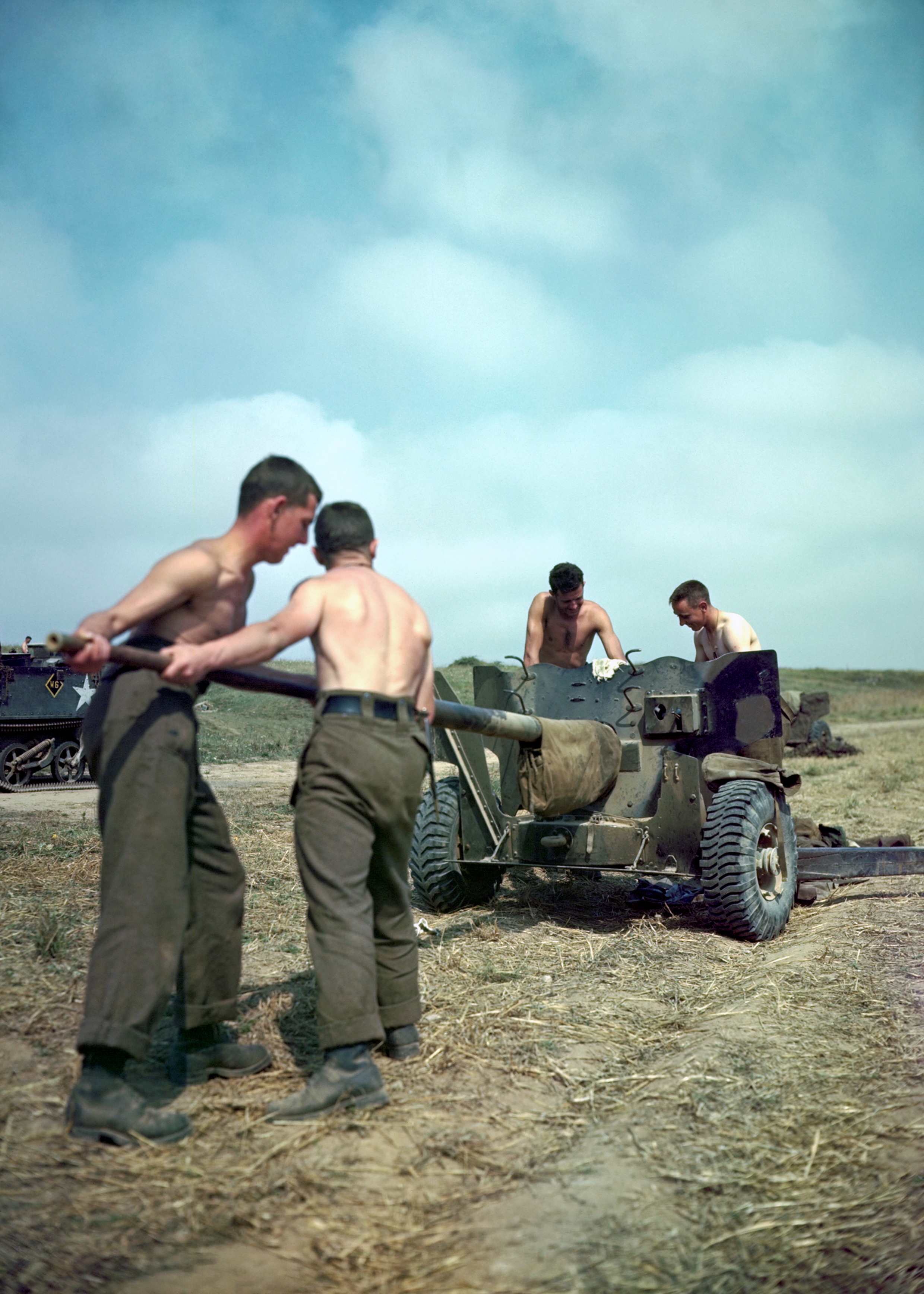 Ces soldats canadiens nettoient ce canon antichar avant de continuer à combattre.